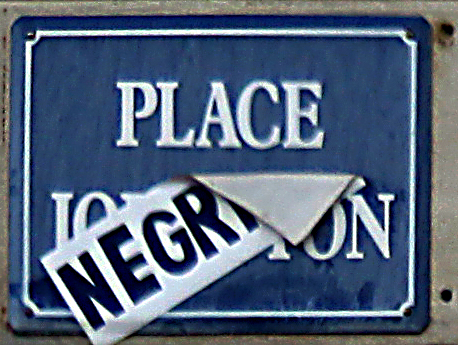 Plaque de la place Johnston à Bordeaux, barré d'un autocollant soulignant l'implication dans la traite des Noirs de l'amateur éponyme (Guillaume Johnston, 1699-1772) - photo 2010